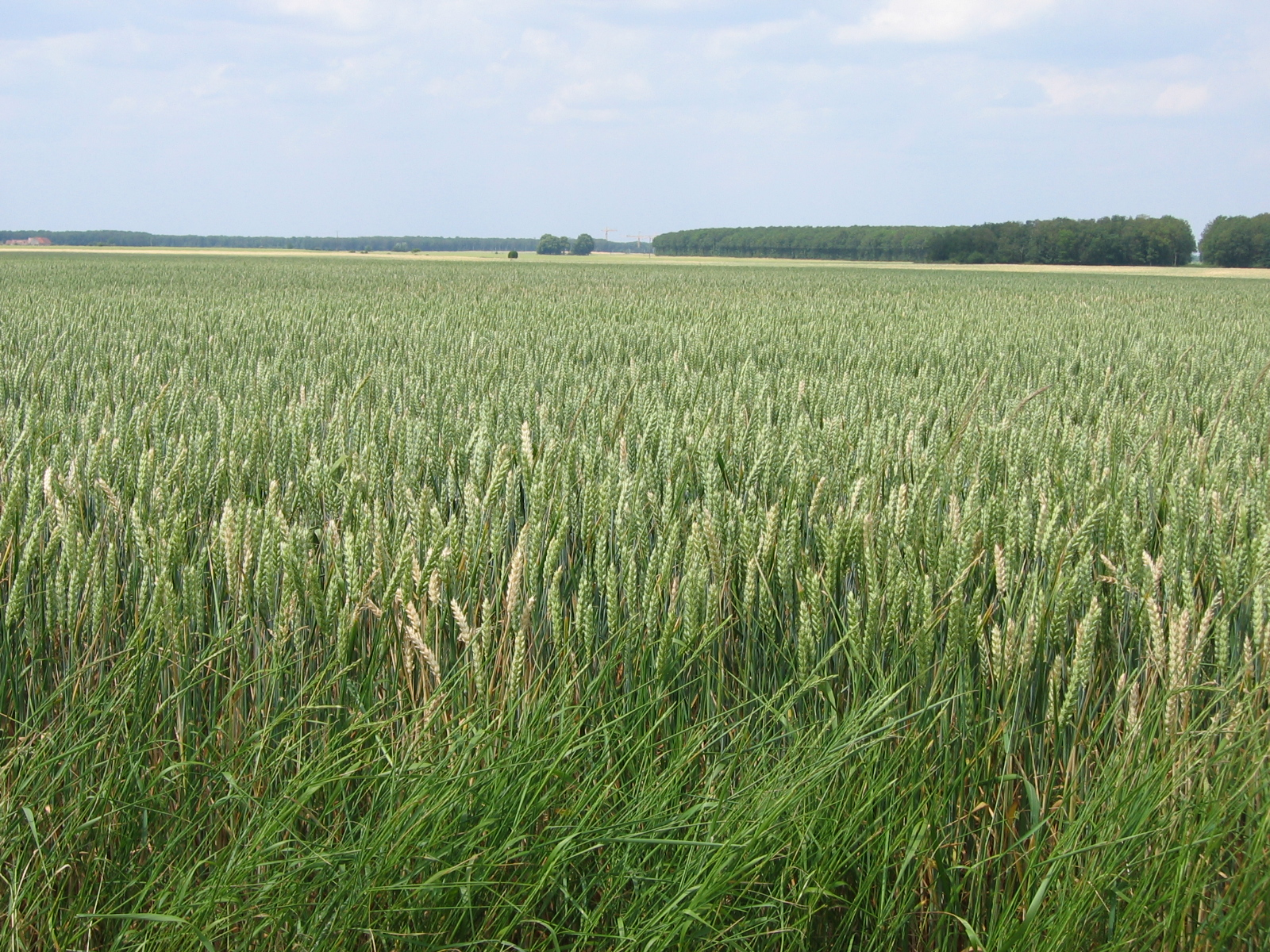 Paysage rural dans la région d'Évreux dans l'Eure en juin